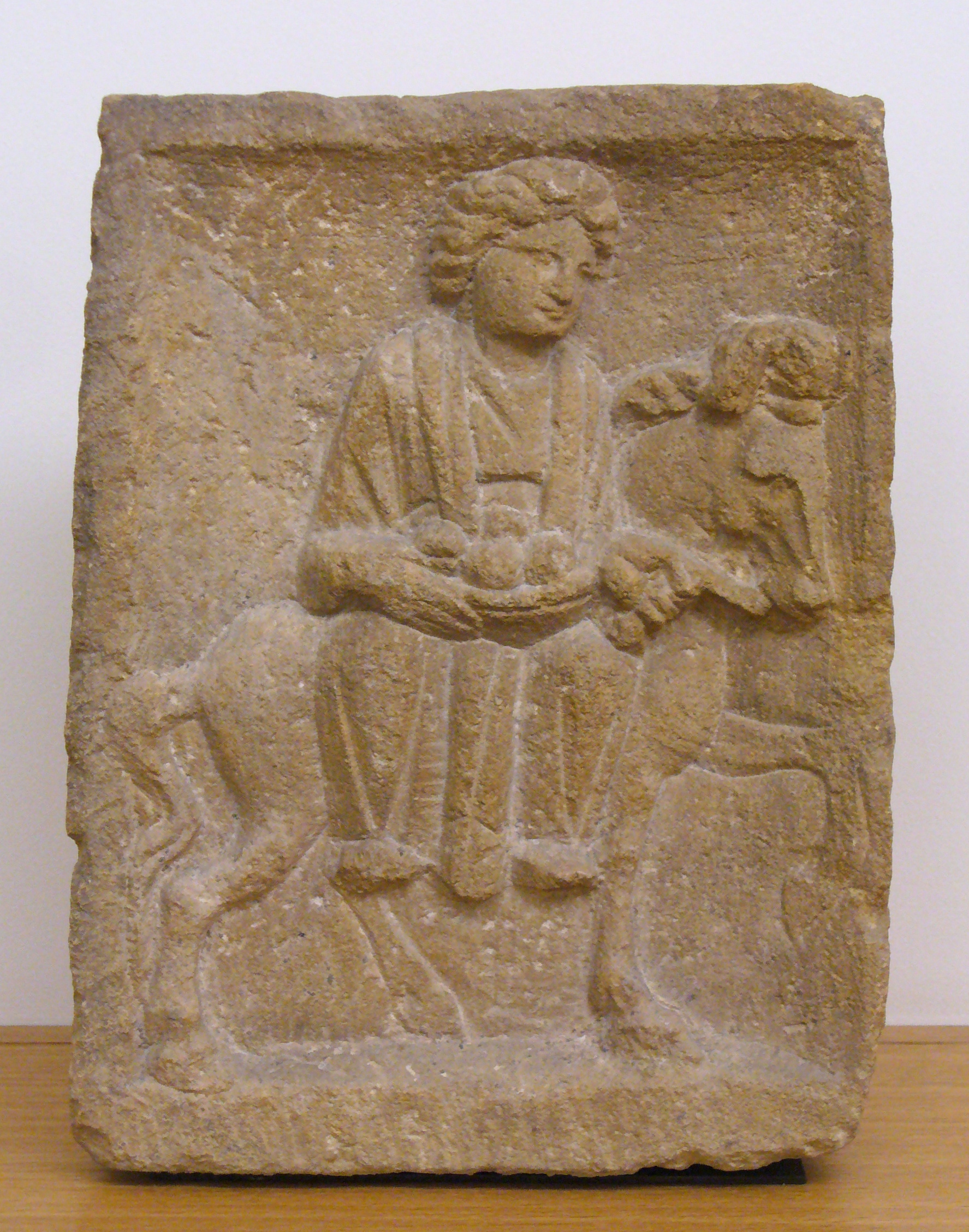 Bas-relief de la déesse romano-celtique Epona, en provenance de Dalheim (Luxembourg), 2° ou 3° siècle de notre ère.